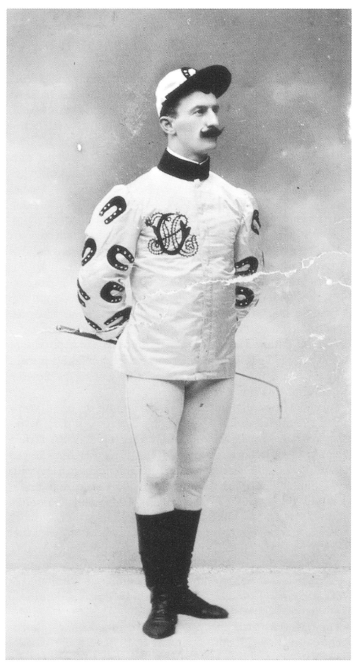 Cirkusdirektör Henning Orlando